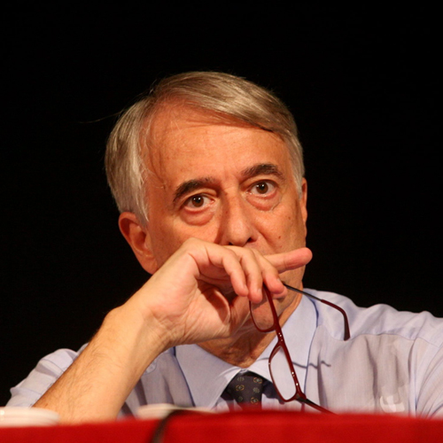 primo piano di Giuliano Pisapia all'iniziativa "Un sindaco per Milano"